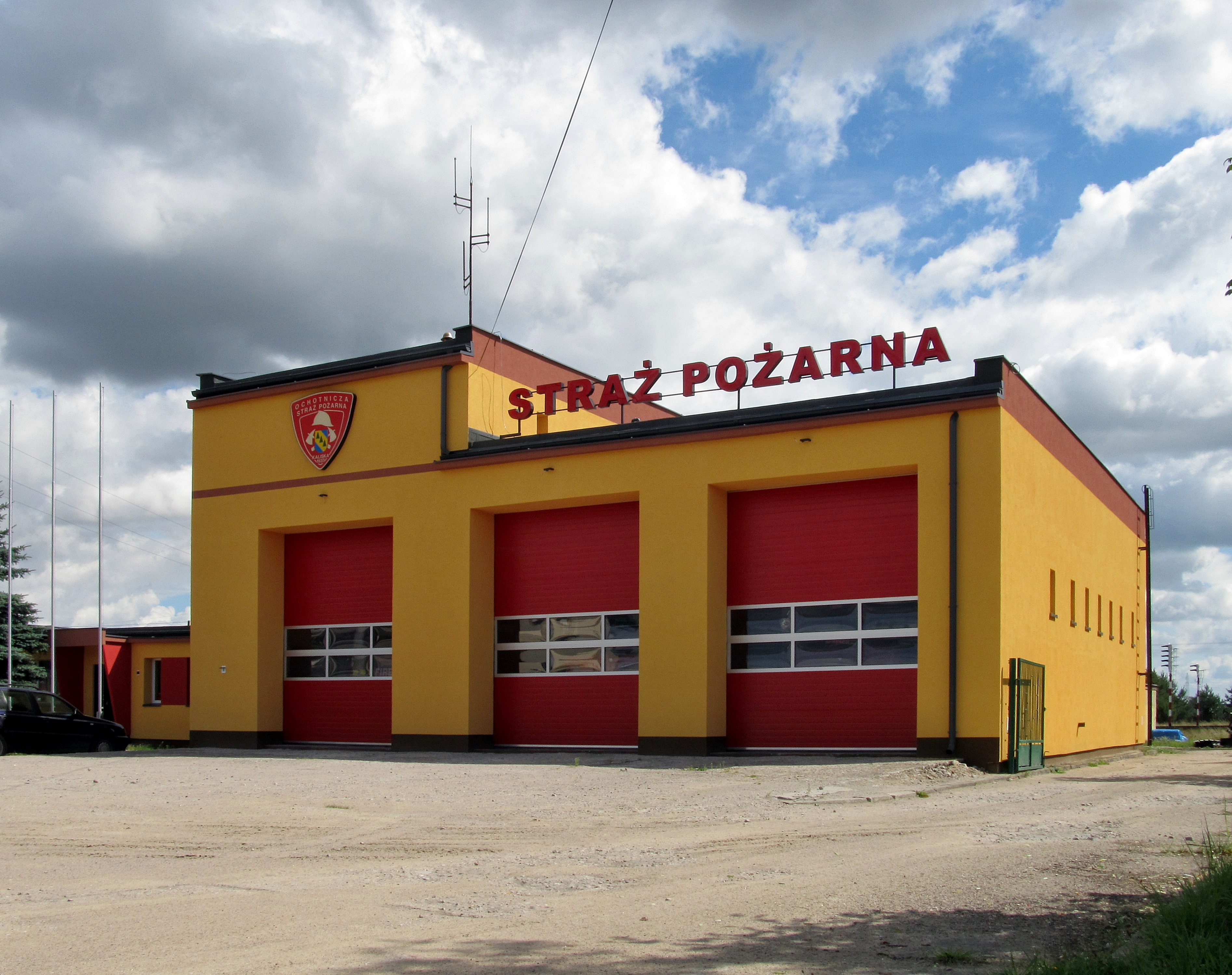 Obiekt remizy OSP został odnowiony i częściowo zmodernizowany